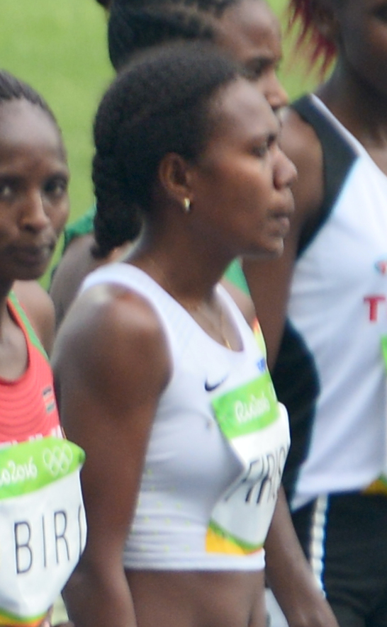 La 1er série du 5000m féminin à Rio 2016